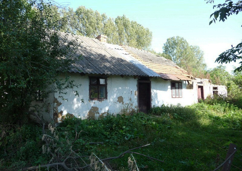 Стара хата,Брундорф